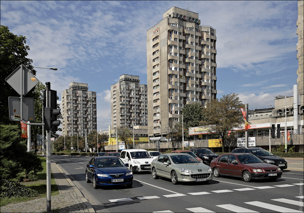 Уроцлаўскія замалёўкі